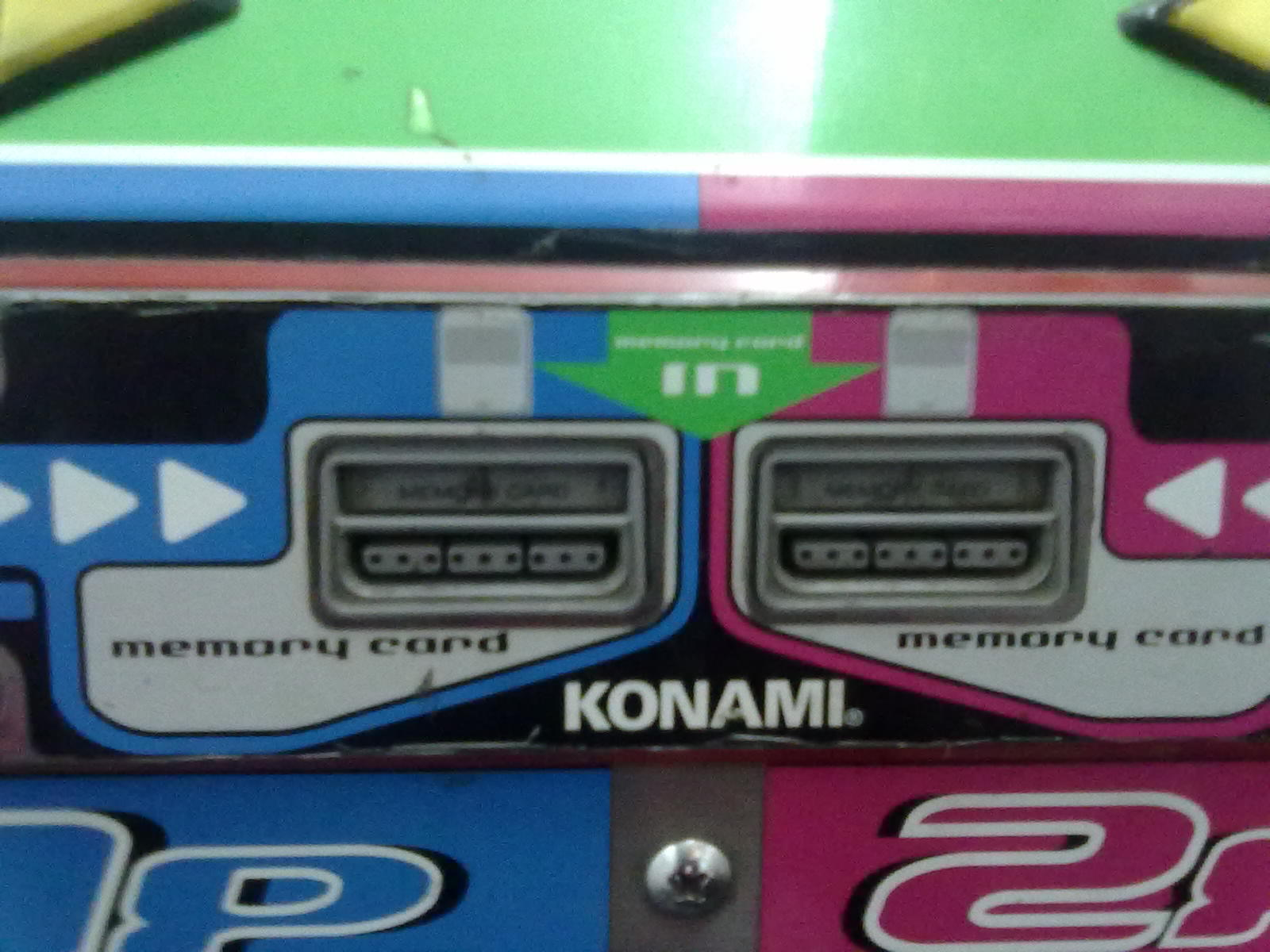 Ranura de Memory Cards PlayStation en una DDR